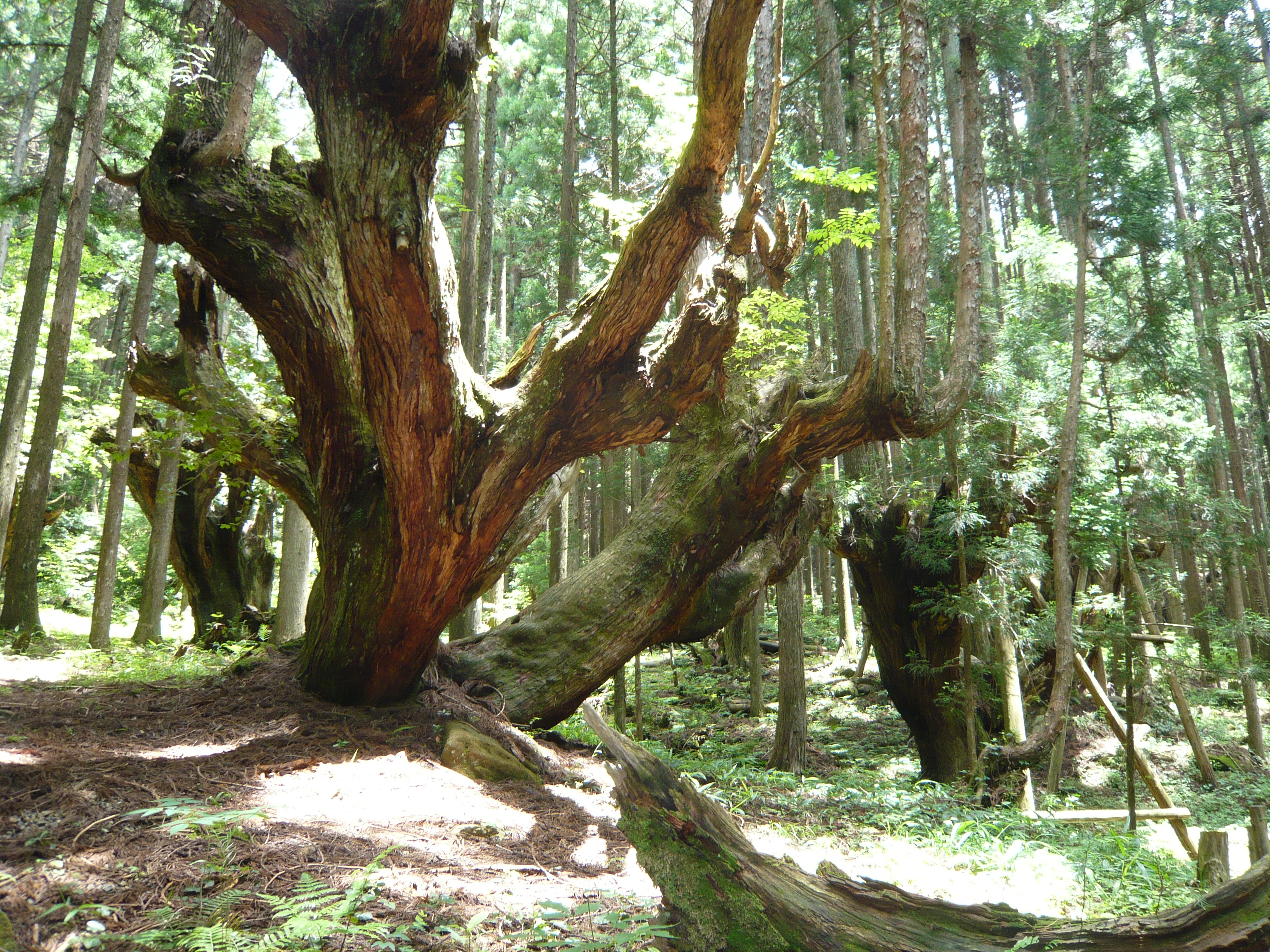 板取21世紀の森